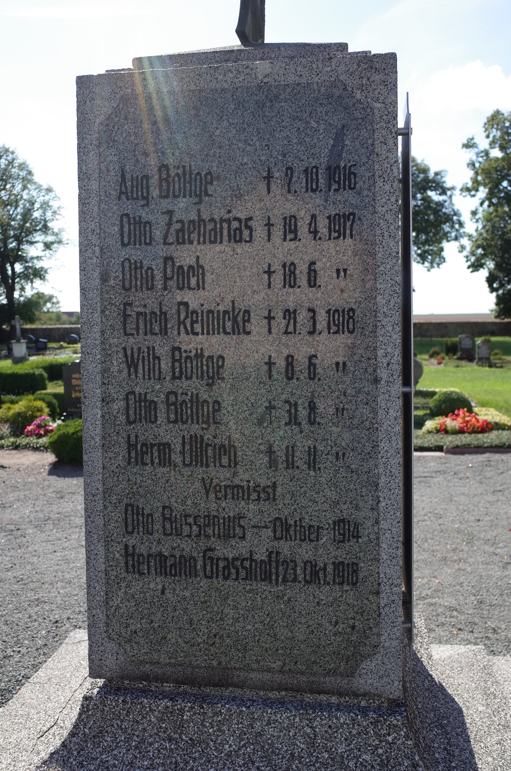 Gommern, Kriegerdenkmal im Ortsteil Vehlitz (Ostseite, I. Weltkrieg, Gefallen 1916-18)